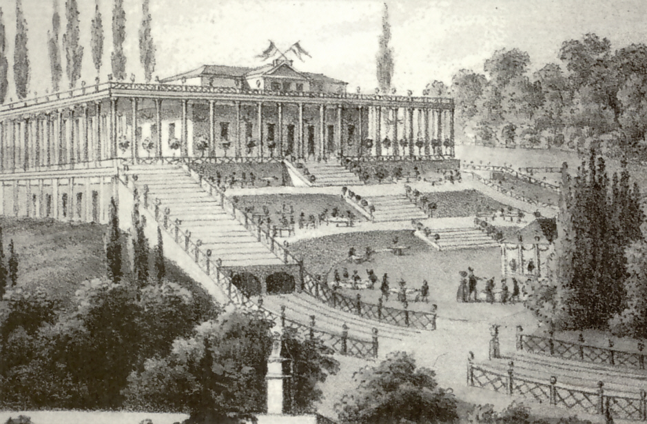 Franz Wolf: Hauptgebäude des Tivoli mit Rutschbahn, Ausschnitt (1830), Lithographie